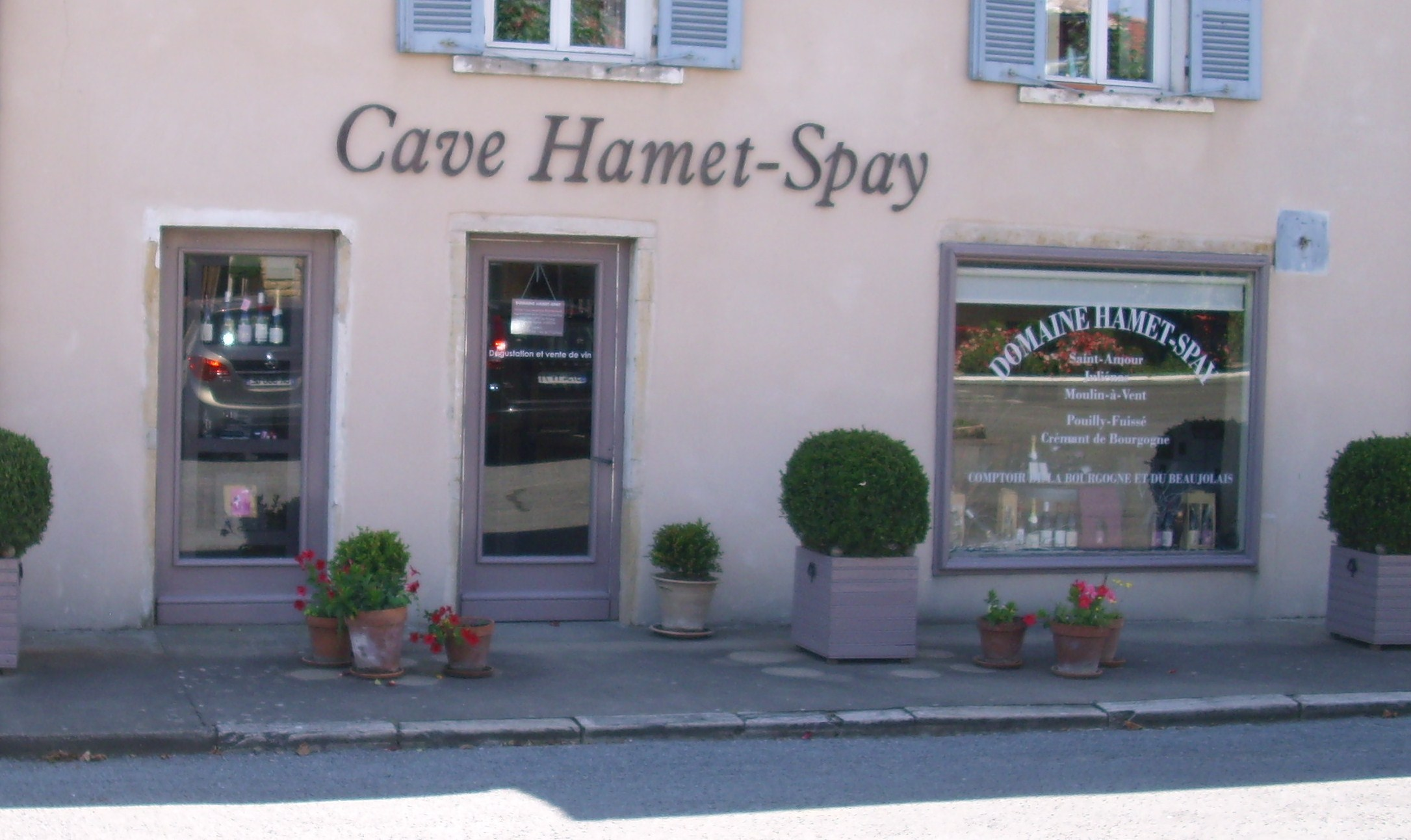 Devant d'un point de vente de vin d'un domaine de Saint-Amour (71)